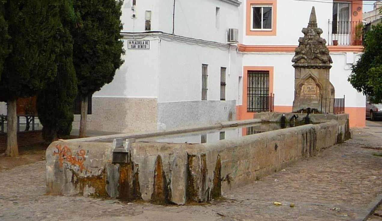 Zafra abrevadero Pilar de San Benito